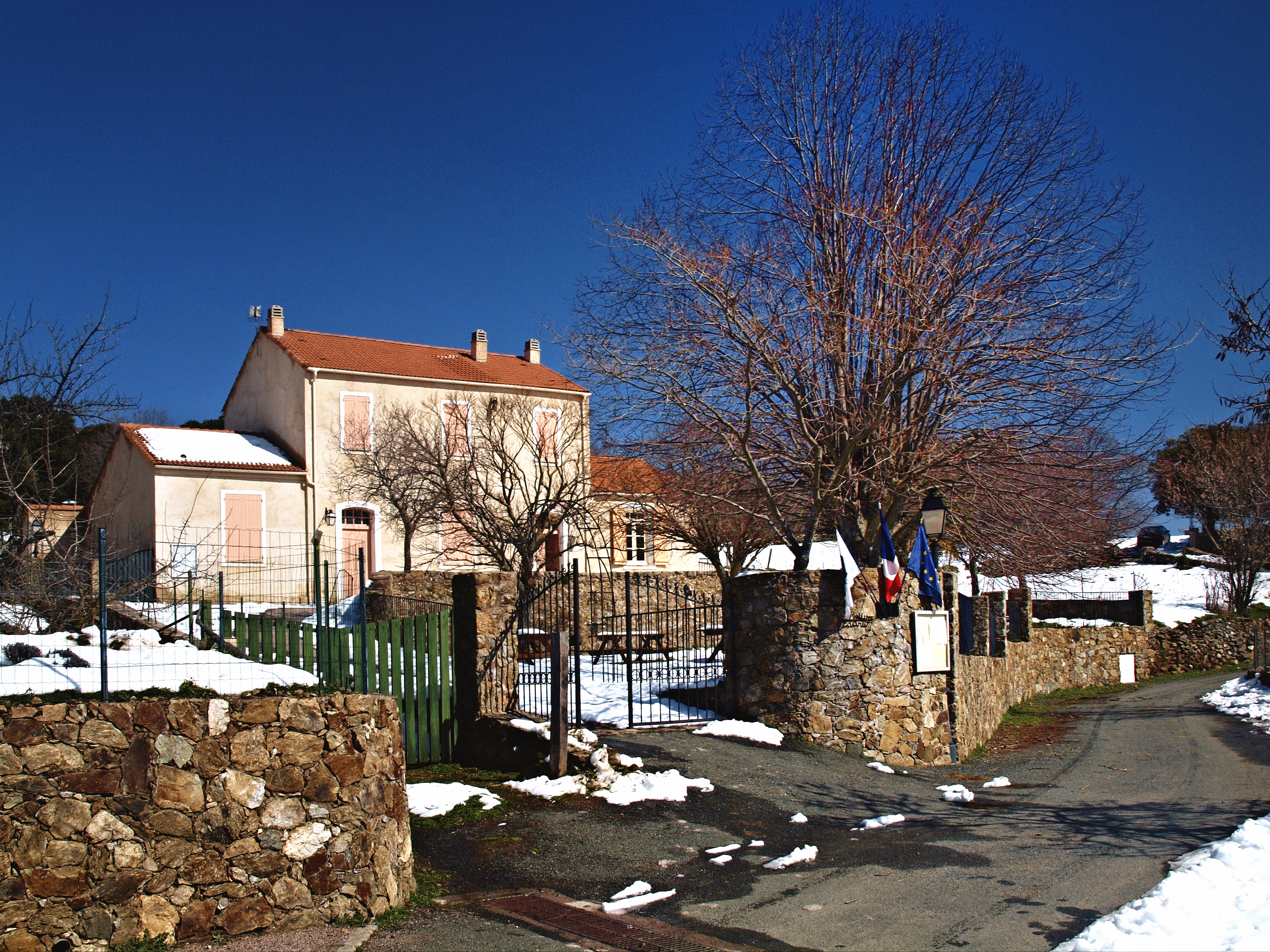 Vallica (Corsica) - La mairie